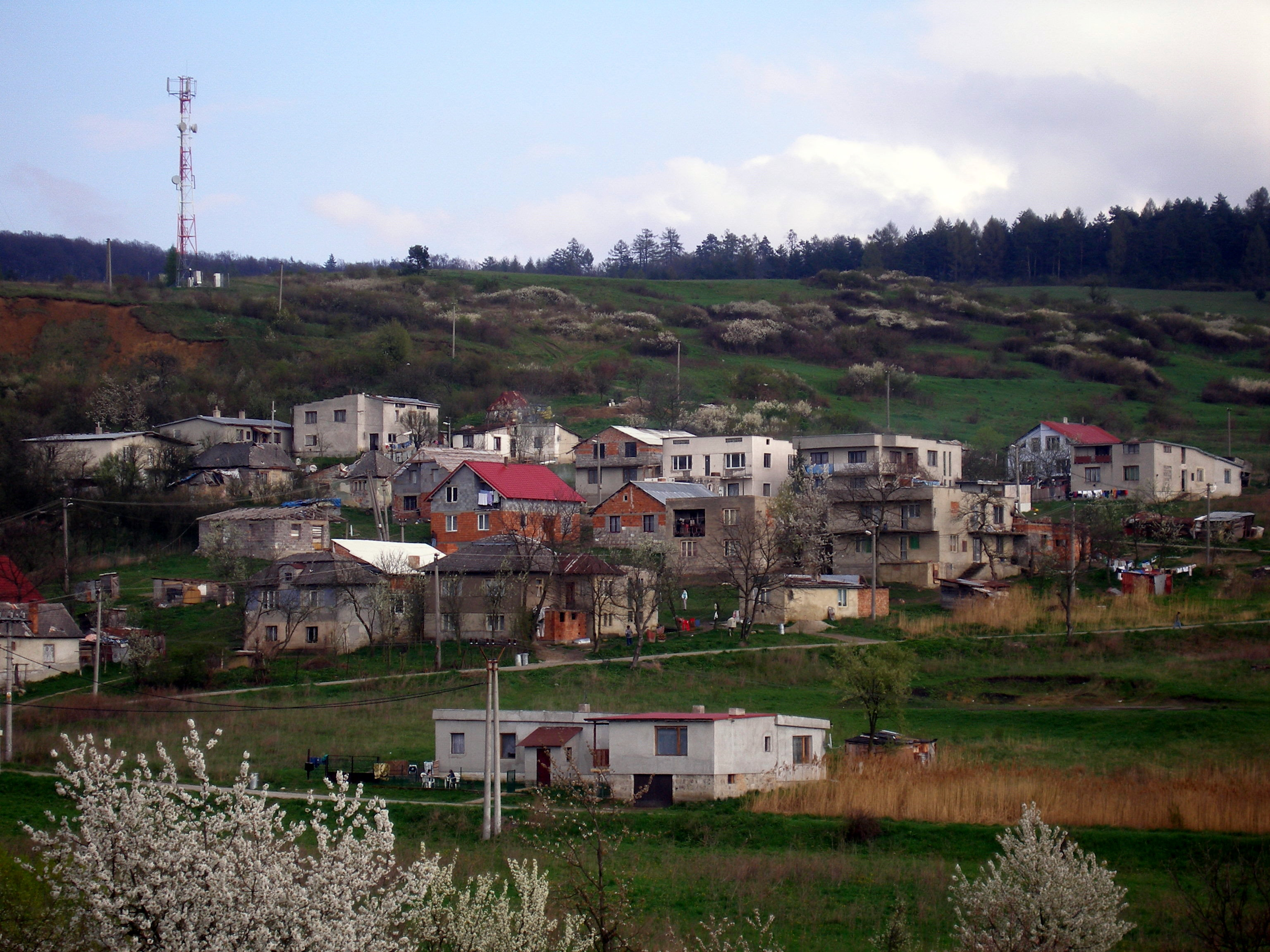 Obec Varhaňovce okres Prešov región Šariš